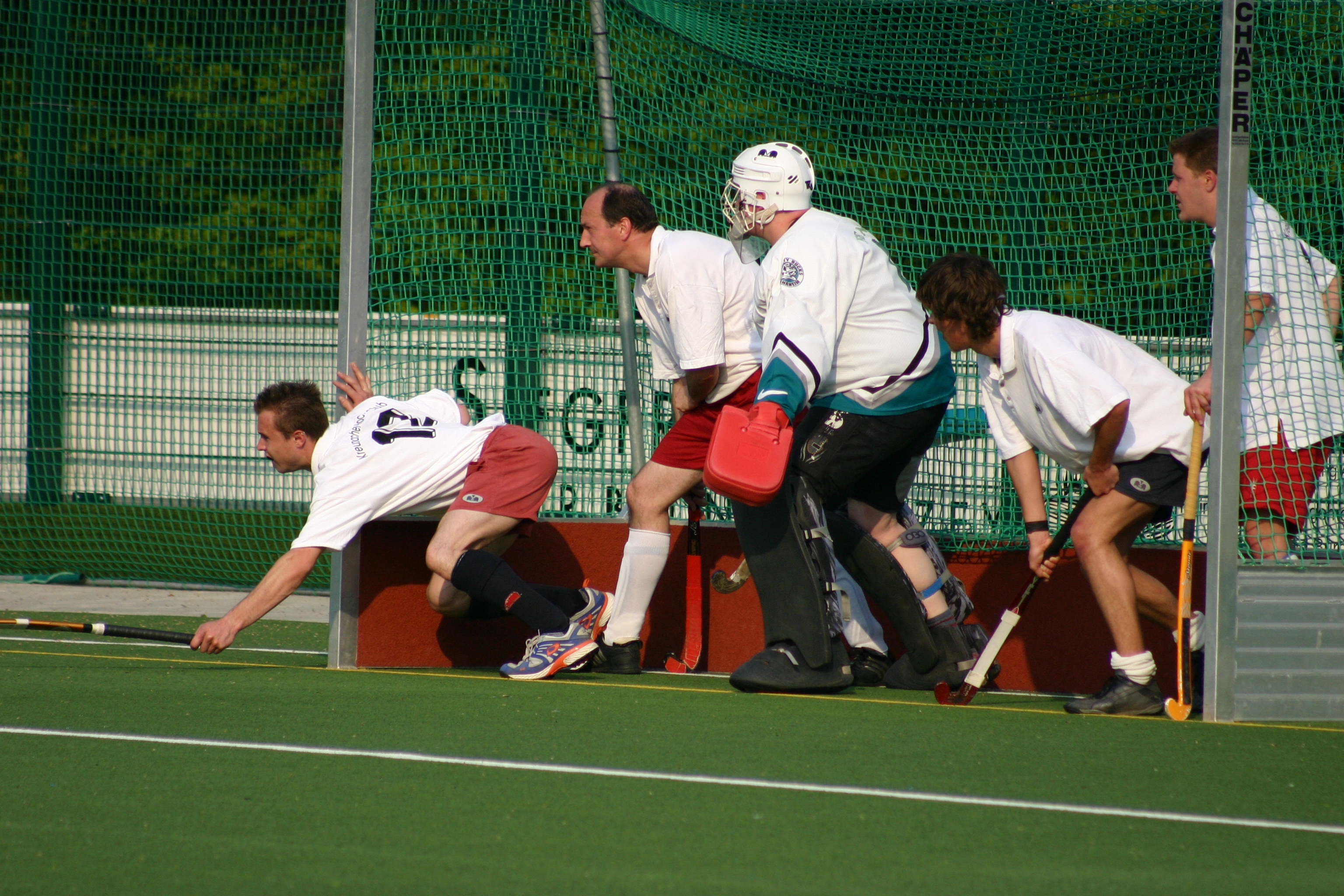 Ein Feldhockeyspiel in Deutschland, die verteidigende Mannschaft bei einer Strafecke